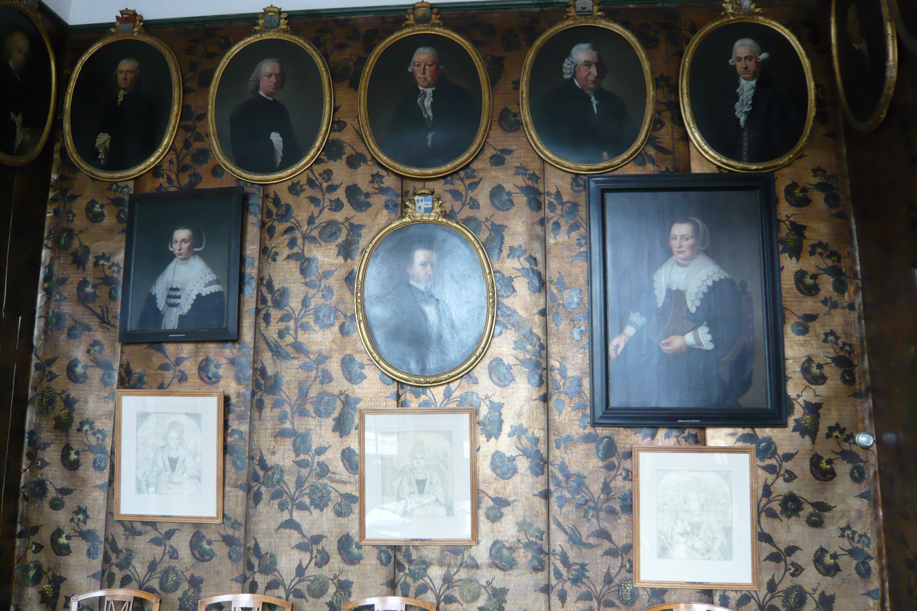 Hofje van Noblet, Haarlem